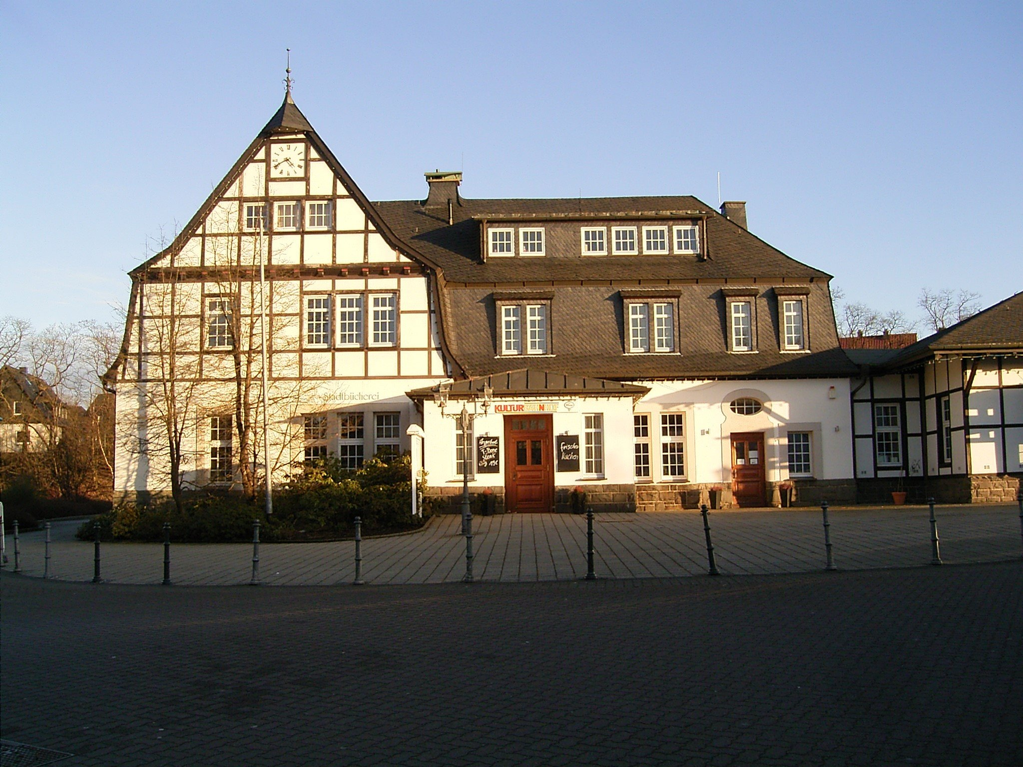 Ehemaliger Bahnhof in Halver